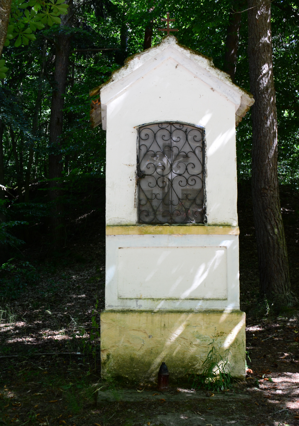 Bildstock beim Friedhof von Podhradí nad Dyjí / Freistein in Südmähren (Tschechische Republik)